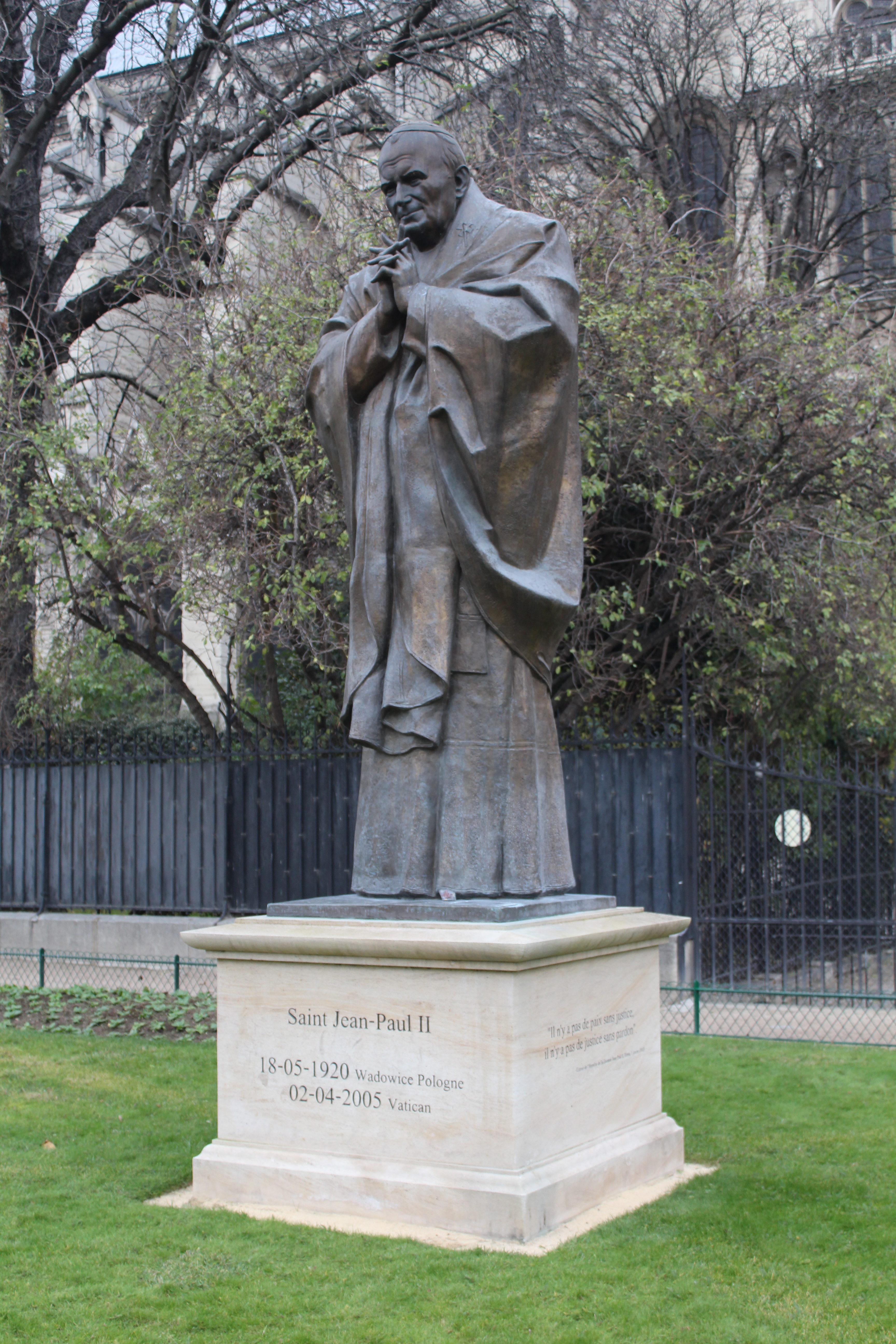 Statue de Jean-Paul II dans le square Jean XXIII.